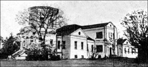 Сядзібны дом Свяцкіх. Здымак да 1914 г.